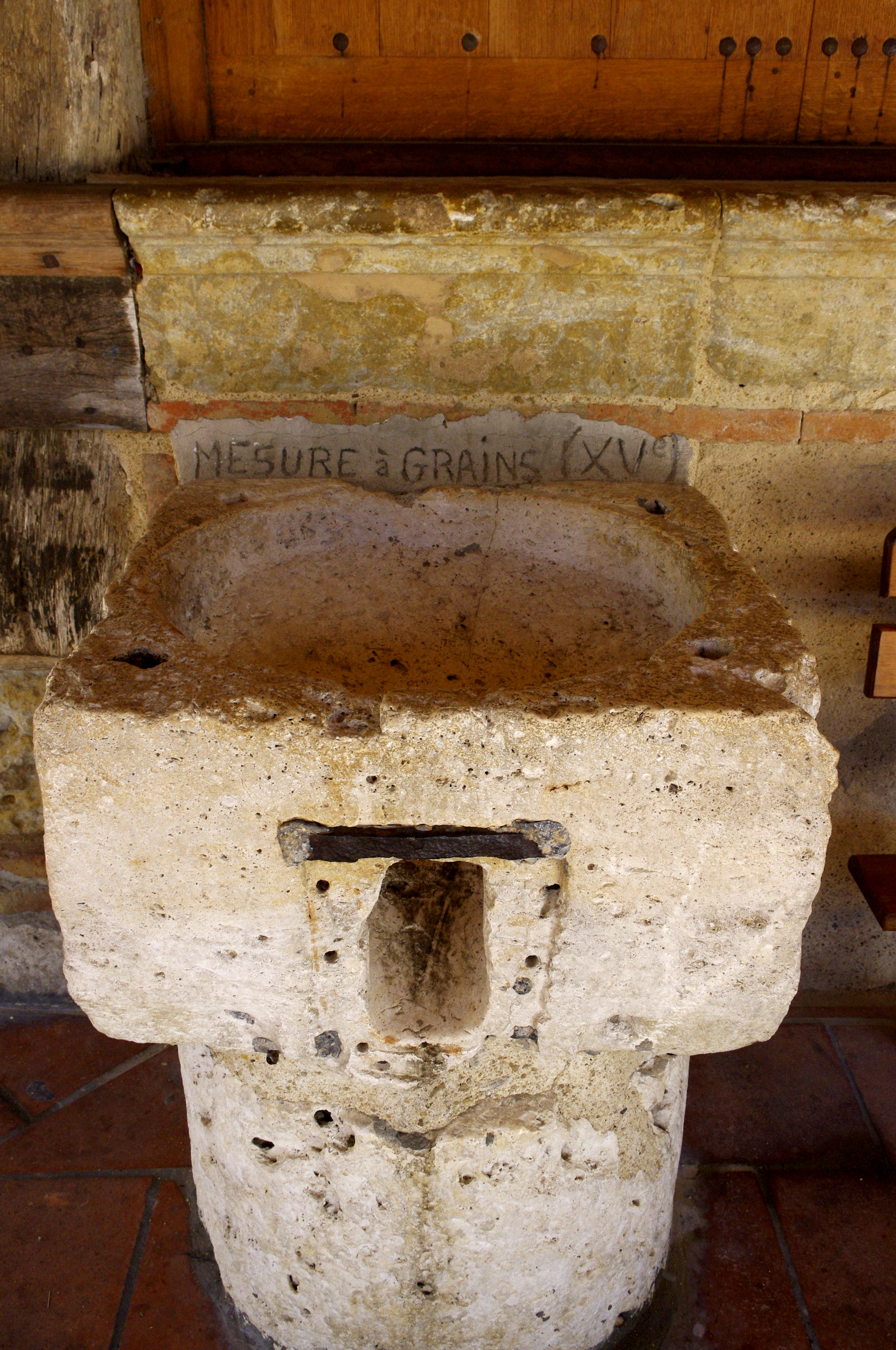 Cologne dans le Gers, France. - Halle, la mesure à grains du 15e siècle. Elle avait probablement une partie haute. Sa capacité aurait été d'environ 40 litres.